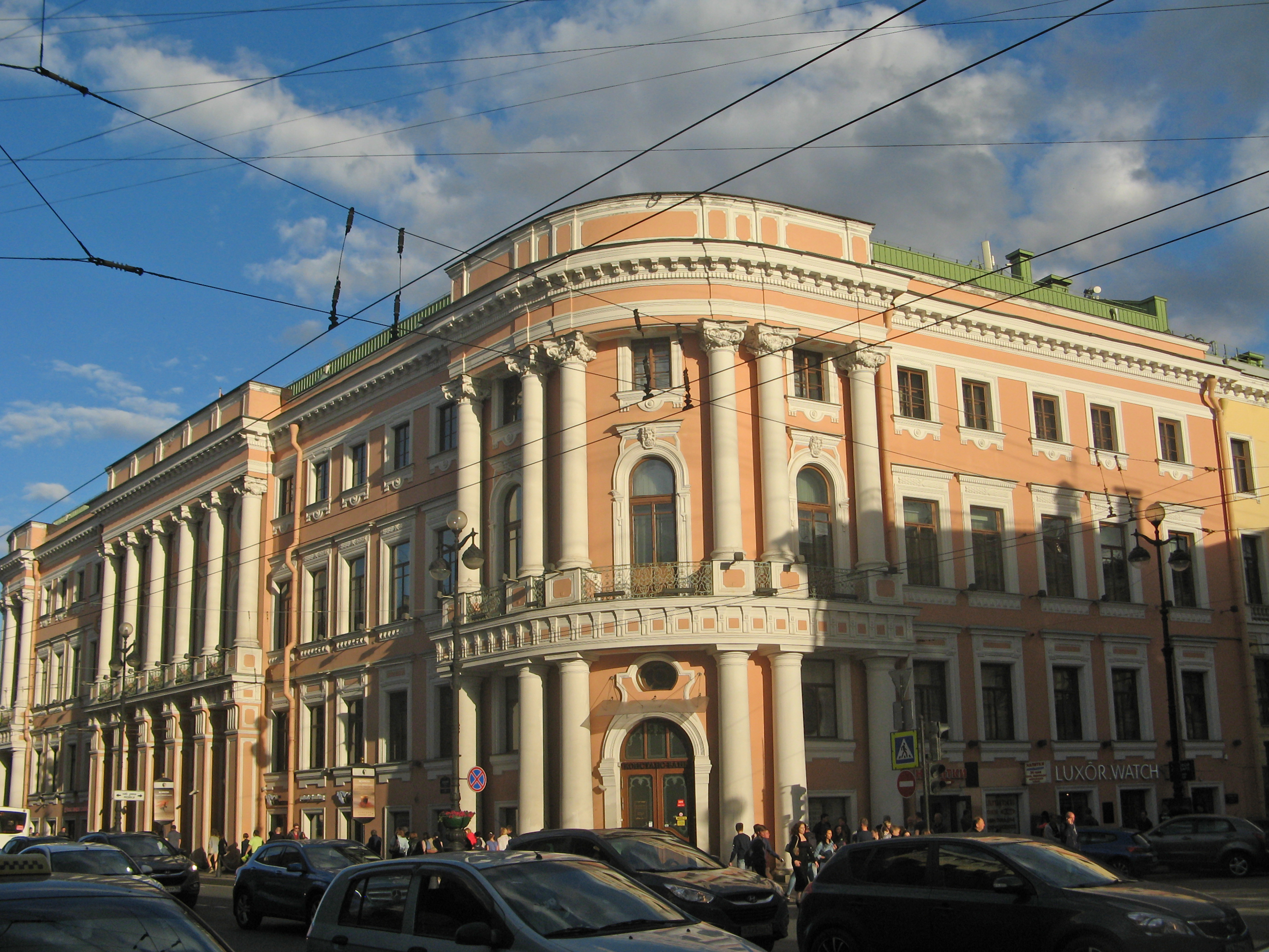 Дом Н.И. Чичерина: Невский проспект, 15, Центральный район, Санкт-Петербург